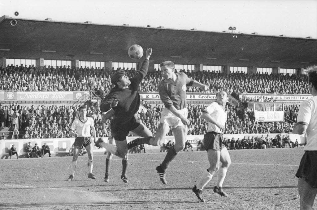 im Holsteinstadion. Im Bild u.a. Holsteins Stürmer Gerd Koll (3.v.l.) im Luftduell mit Paulis Torwart Thoms (2.v.l.).